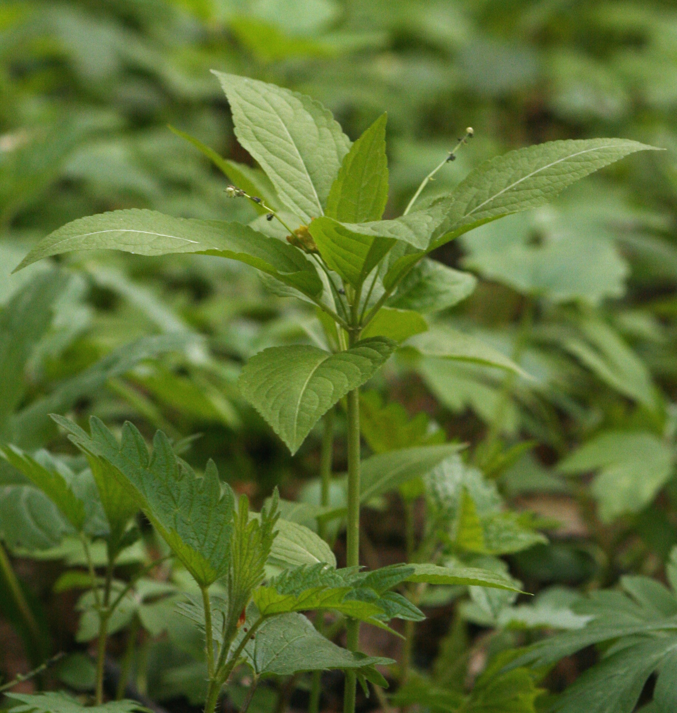 Szczyr trwały (Mercurialis perennis)